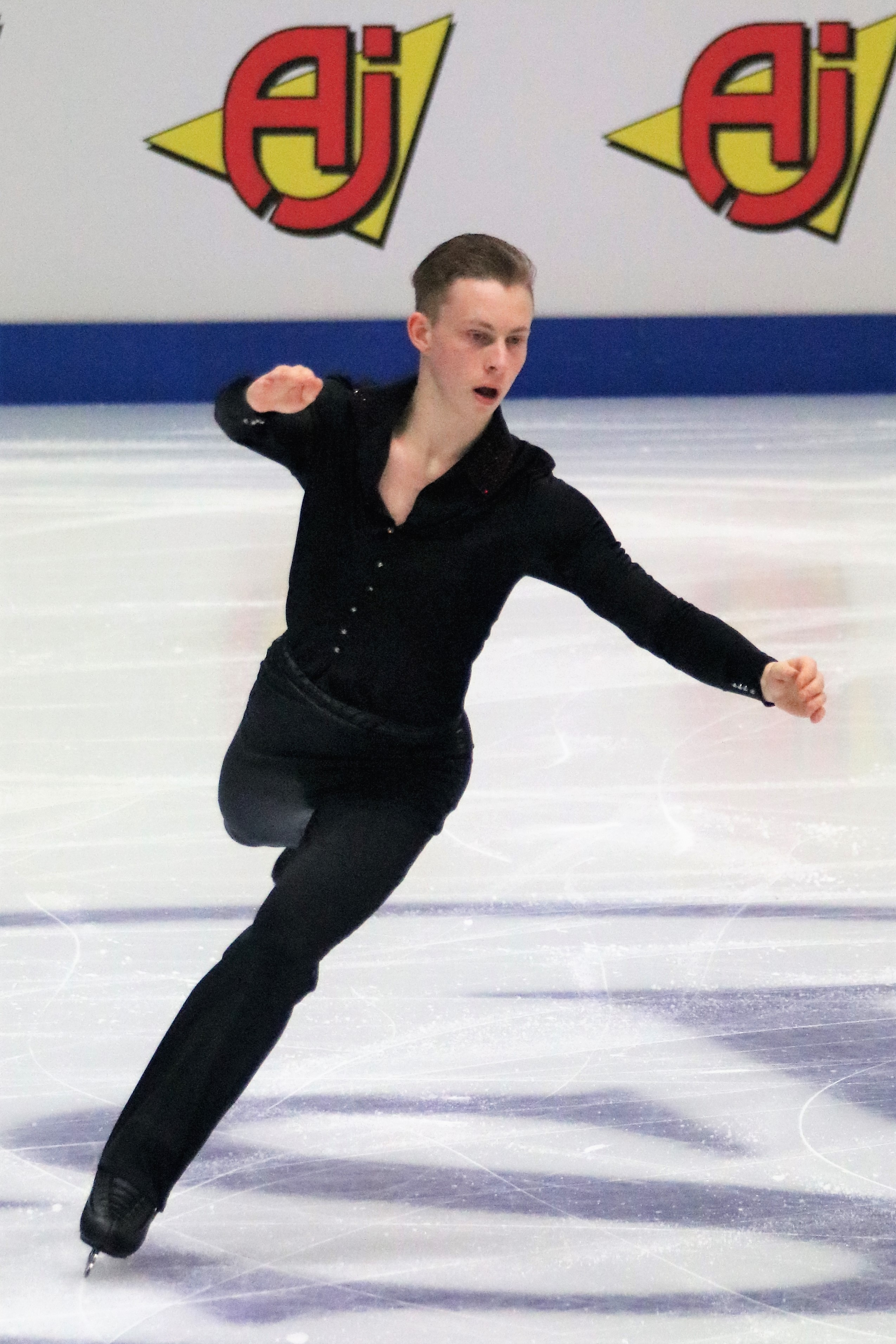 Николай Майоров (Швеция) на чемпионате Европы по фигурному катанию 2020